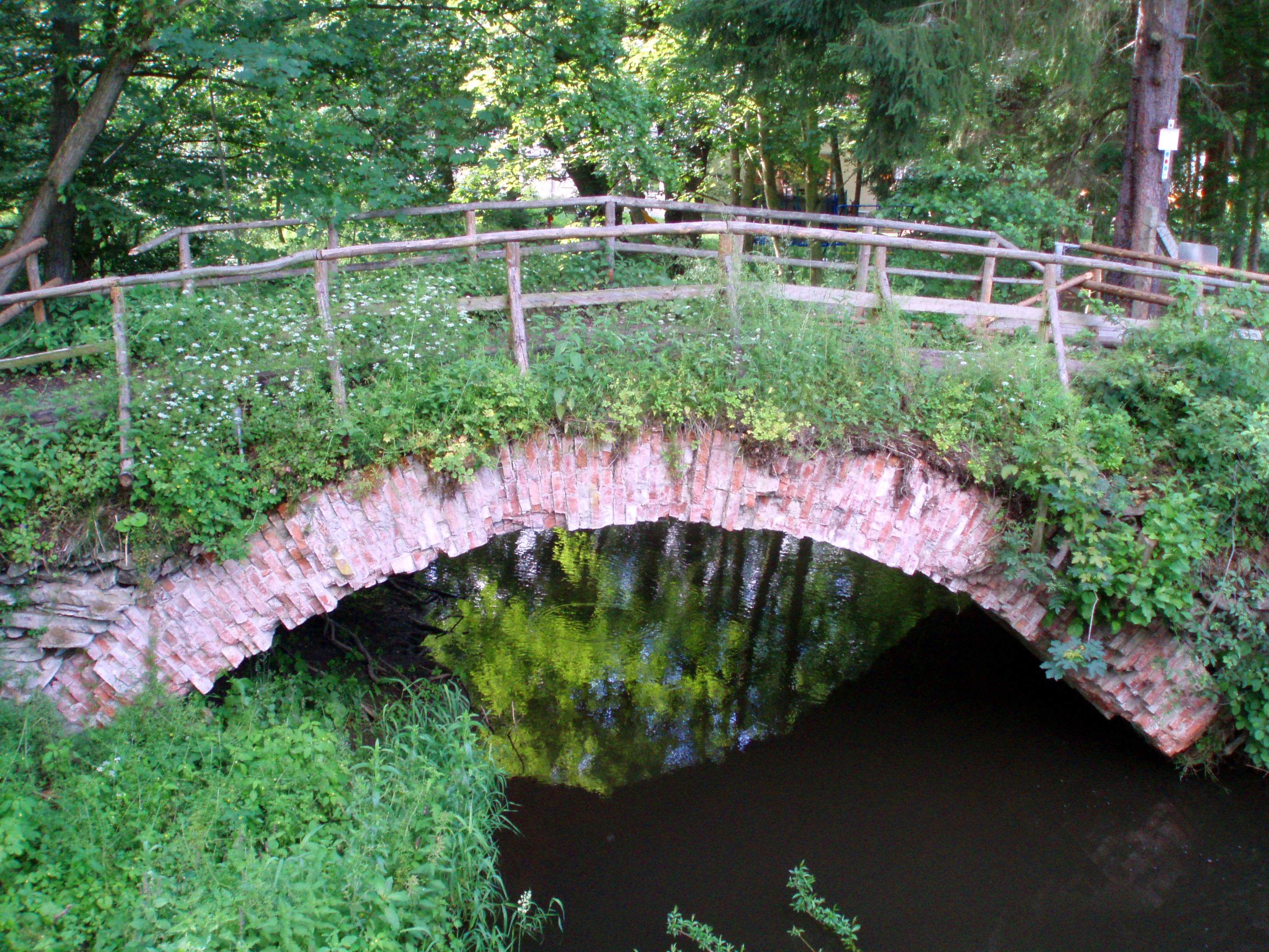 Brücke im Selketal bei der Selkemühle